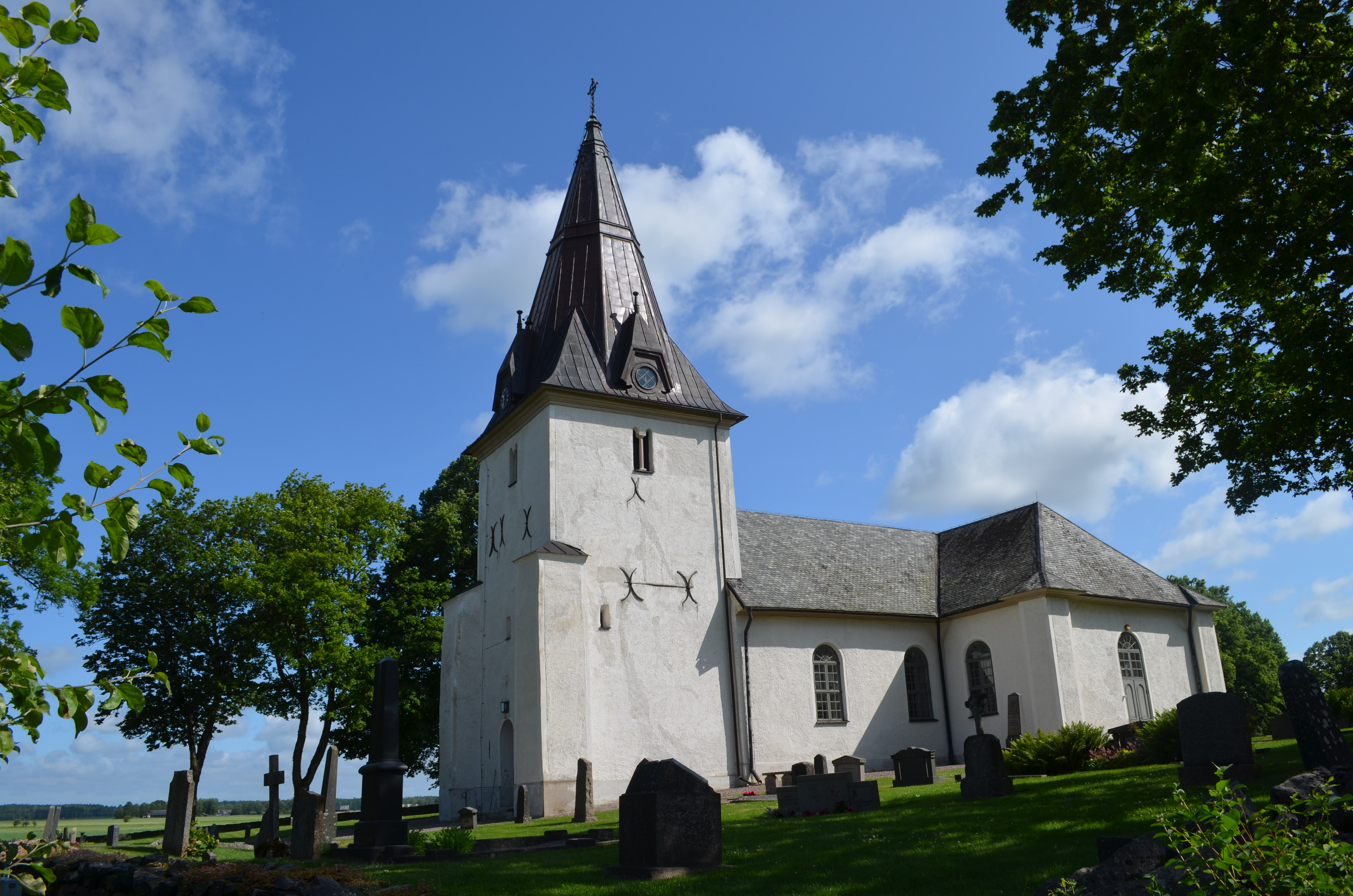 Fägre kyrka